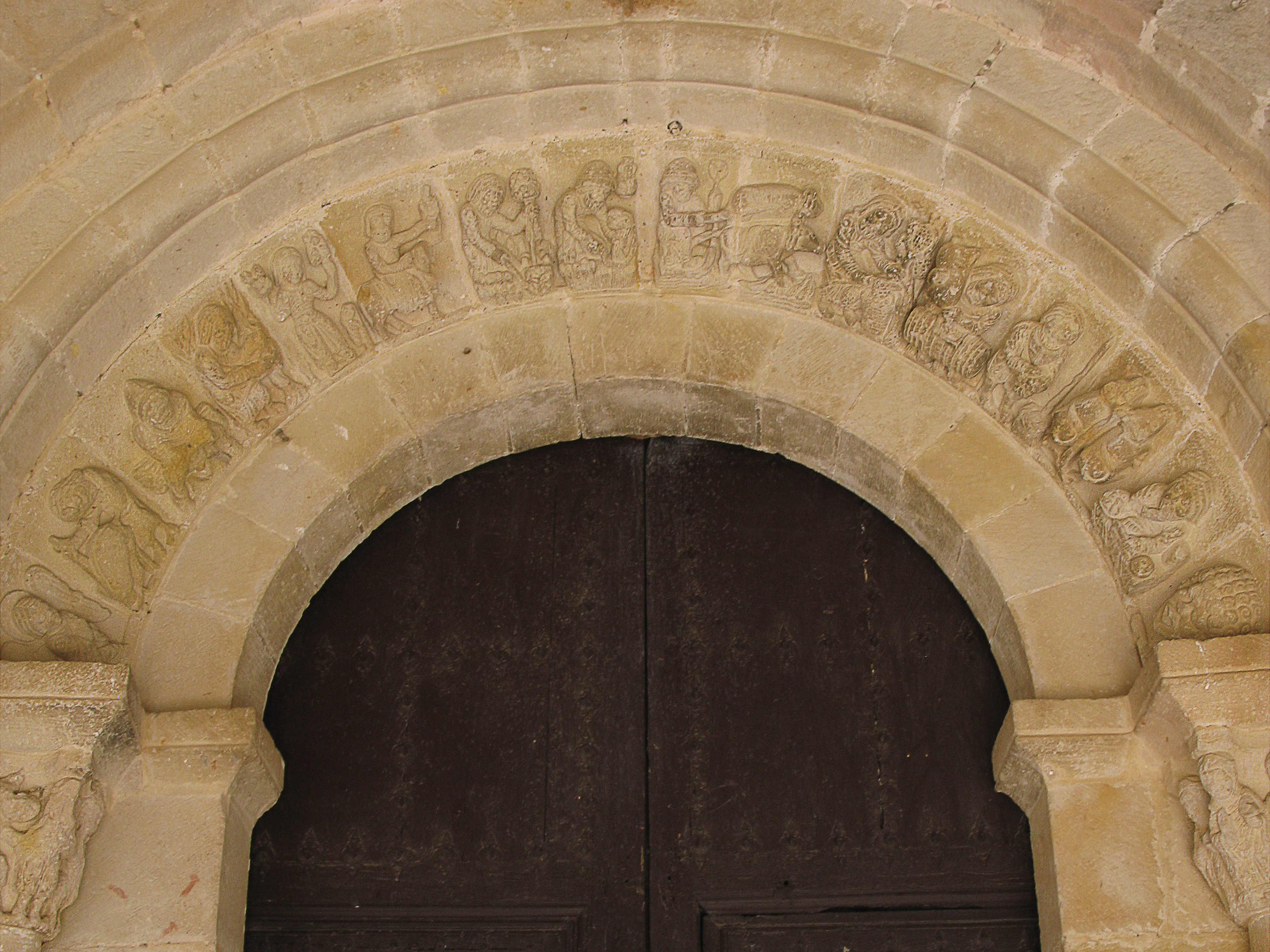 En la portada románica de la iglesia de San Miguel existe una representación de los meses del año por medio de escenas agrícolas correspondientes a los mismos; estas escenas están cinceladas en las dovelas que forman el arco de entrada a la iglesia. El hecho de que haya estado la portada dentro del atrio porticado, protegiéndola de la intemperie durante siglos, ha sido la razón por la cual ha llegado a nosotros en un estado de conservación bastante aceptable. El conjunto de estas escenas recibe distintos nombres, algunos dicen mensuario o mensario, otros lo llaman menologio, y otros calendario agrícola que es el que más propiamente lo define. Sus catorce relieves de la arquivolta, los que con su color están pidiendo ser colocados en el lugar interpretativo que les corresponde. Y esto se sale por completo del reducido ámbito de la región y el pueblo de Beleña, para entrar de lleno en la ancha corriente histórica que nace en el mundo pagano de la península Itálica y cuaja finalmente en el crisol medieval de la Europa cristiana. De esta expresión artística, que no es muy corriente, se conservan varios calendarios en España; unos están esculpidos en piedra, como el de la iglesia de Beleña. Otros son pinturas al fresco, como el de San Isidoro de León; y otros están bordados, como el del Tapiz de la Creación (parcialmente conservado) que se custodia en la catedral de Gerona. También se puede encontrar alguno en otros países, como en Francia, en Italia